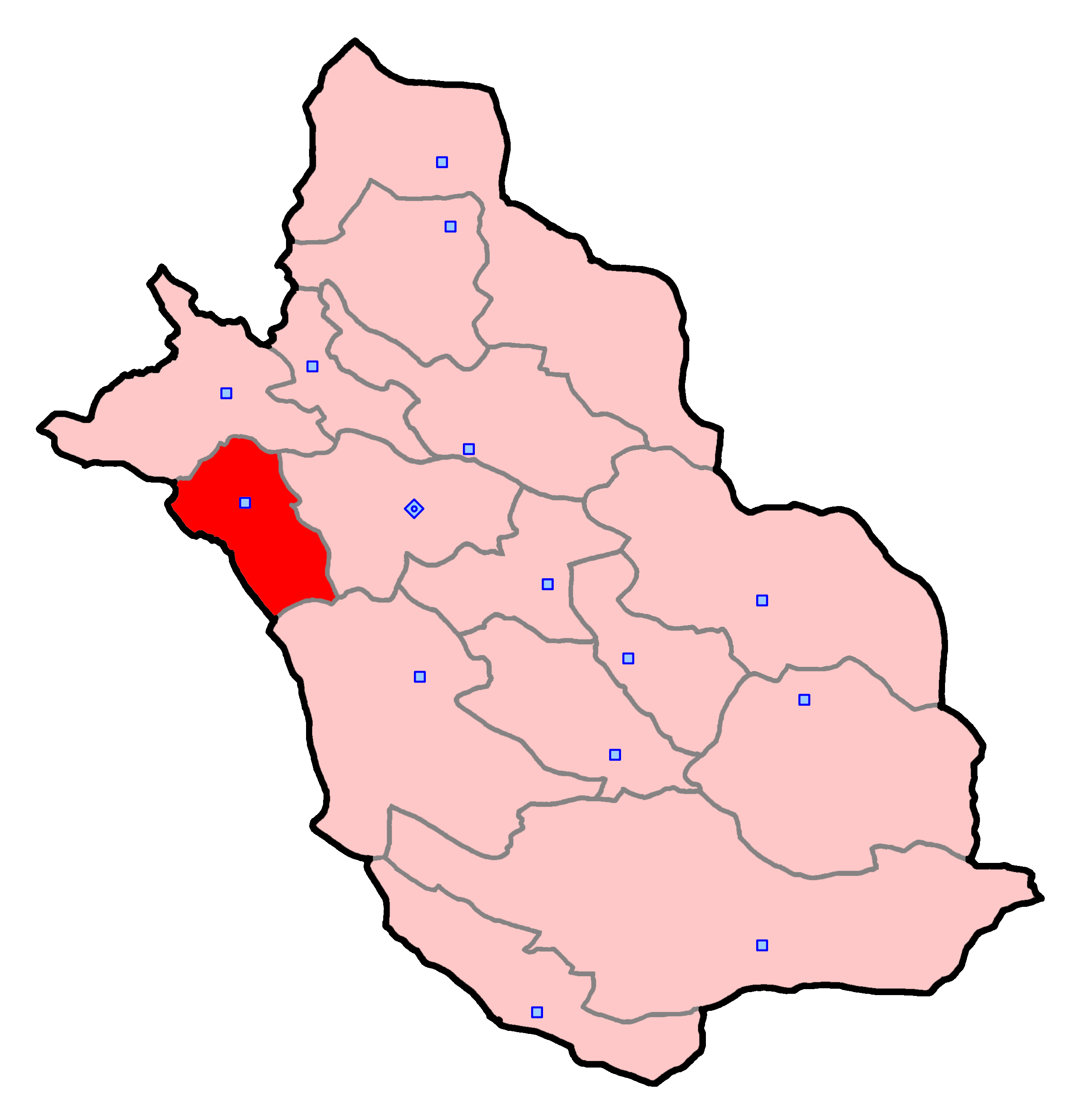 حوزهٔ انتخاباتی کازرون برای انتخابات مجلس شورای اسلامی